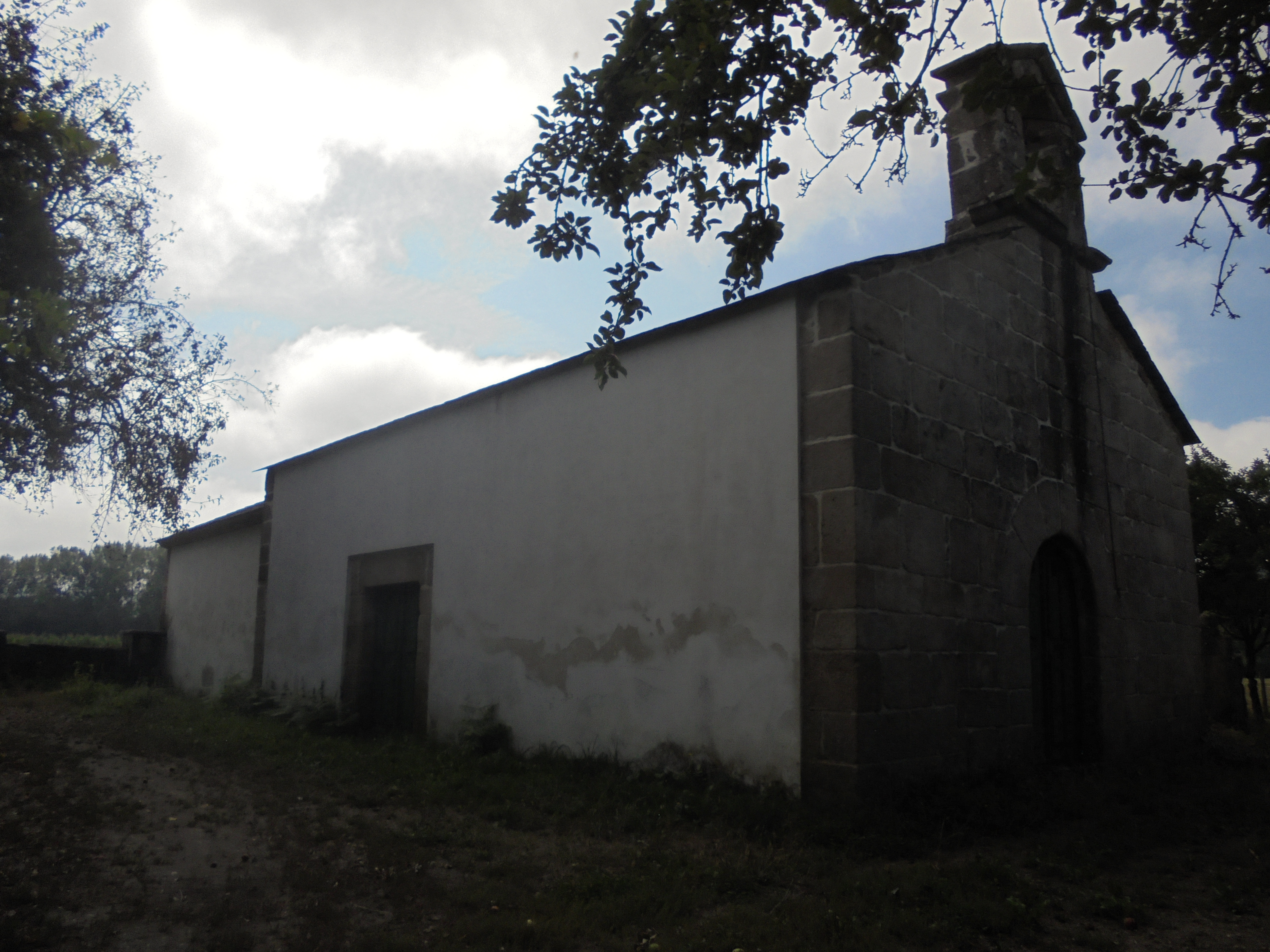 Igrexa parroquial de Santa María de Vilambrán